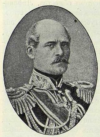 Выборгский губернатор Котен, Казимир Густавович